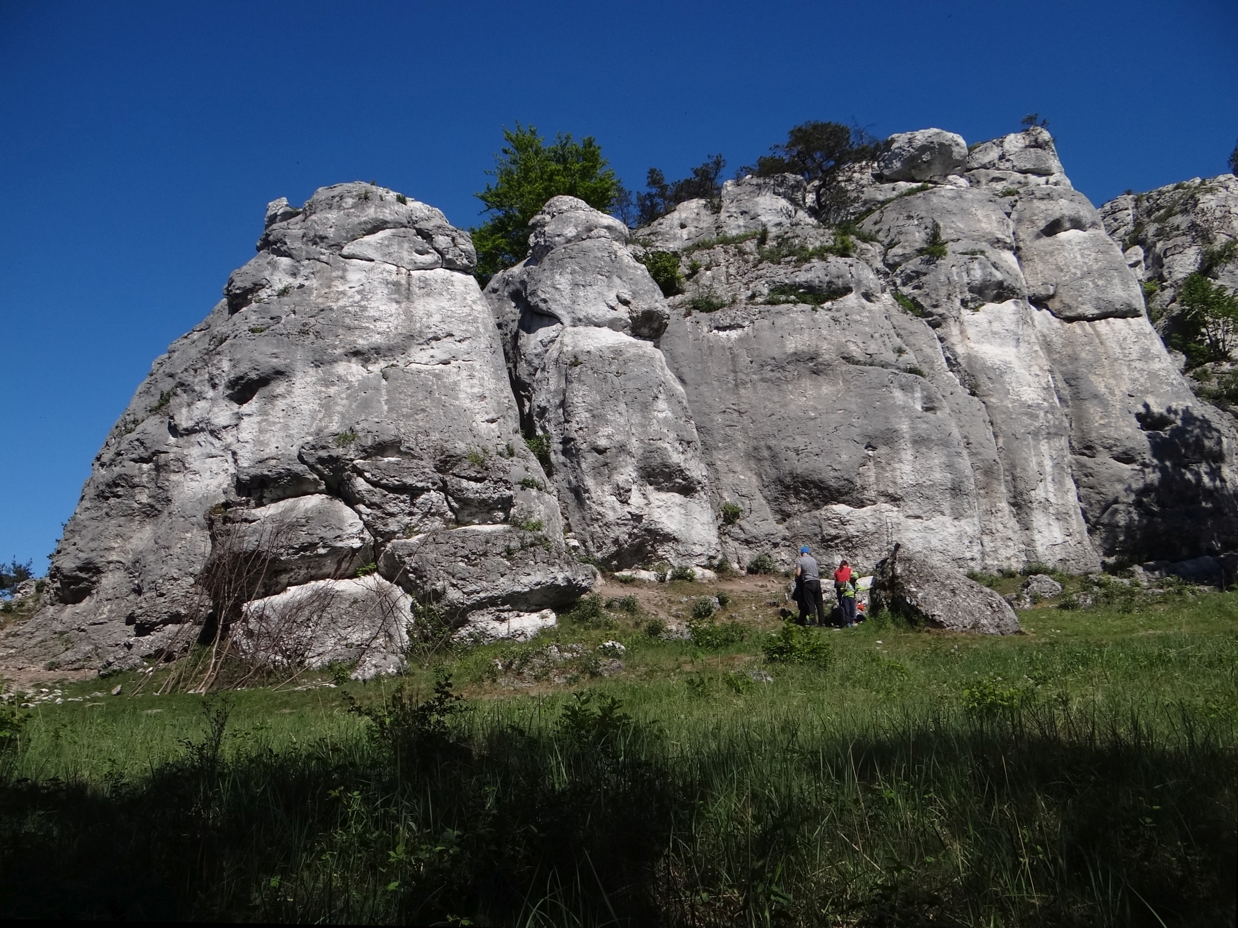 Formy skałkowe na Górze Zborów